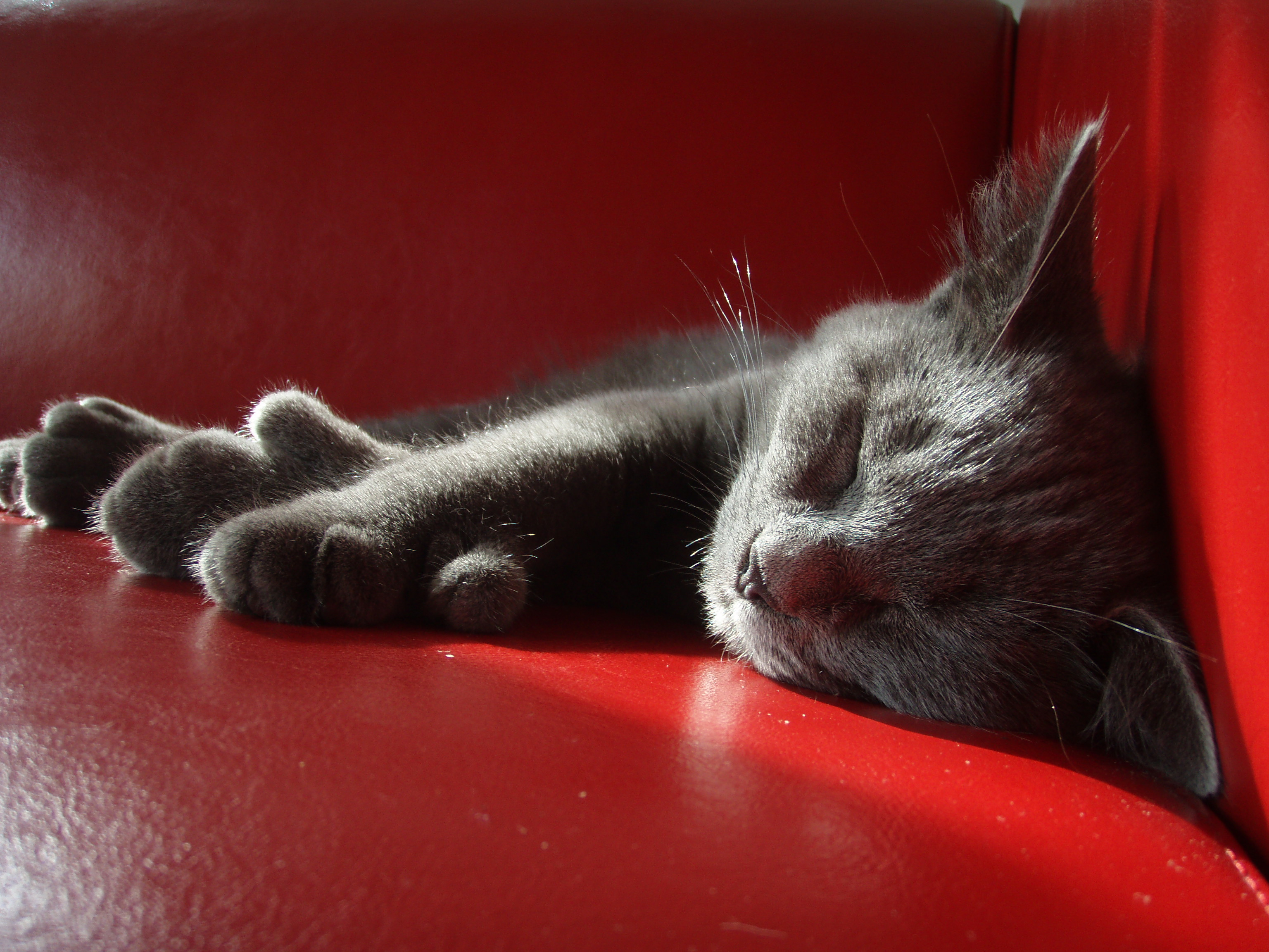 Polydactyl cat